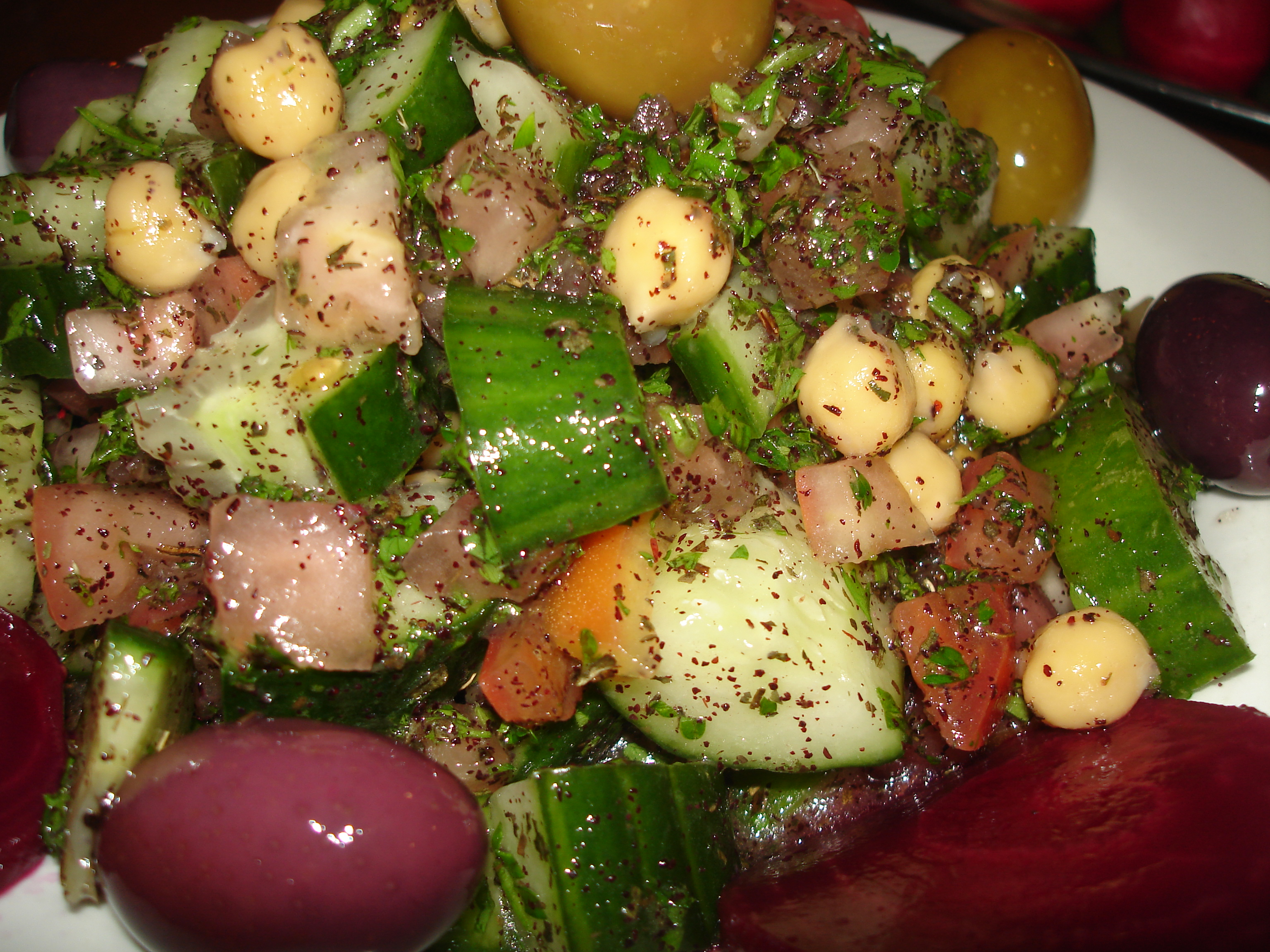 Iraqi salad